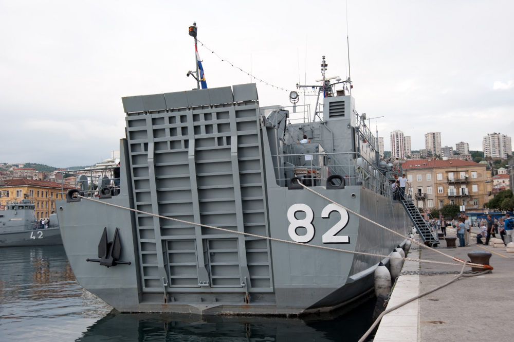 Dan HRM-a, Rijeka